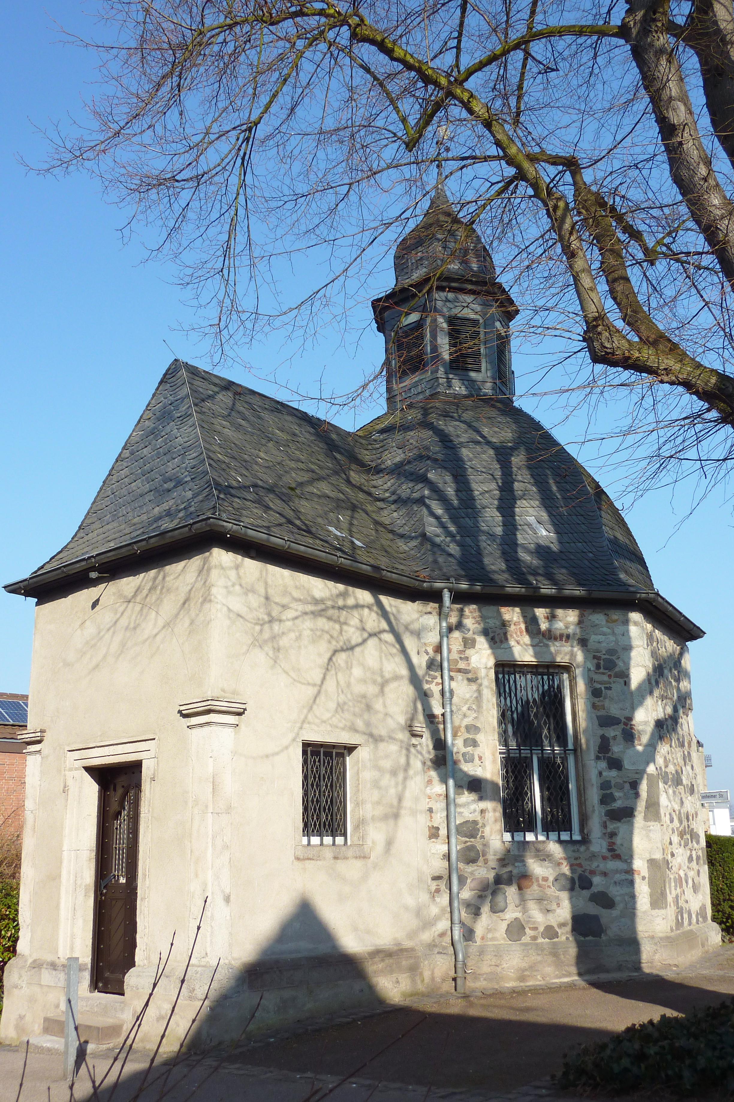 Kapelle Sieben Schmerzen Mariens in Mehlem, einem Ortsteil von Bonn